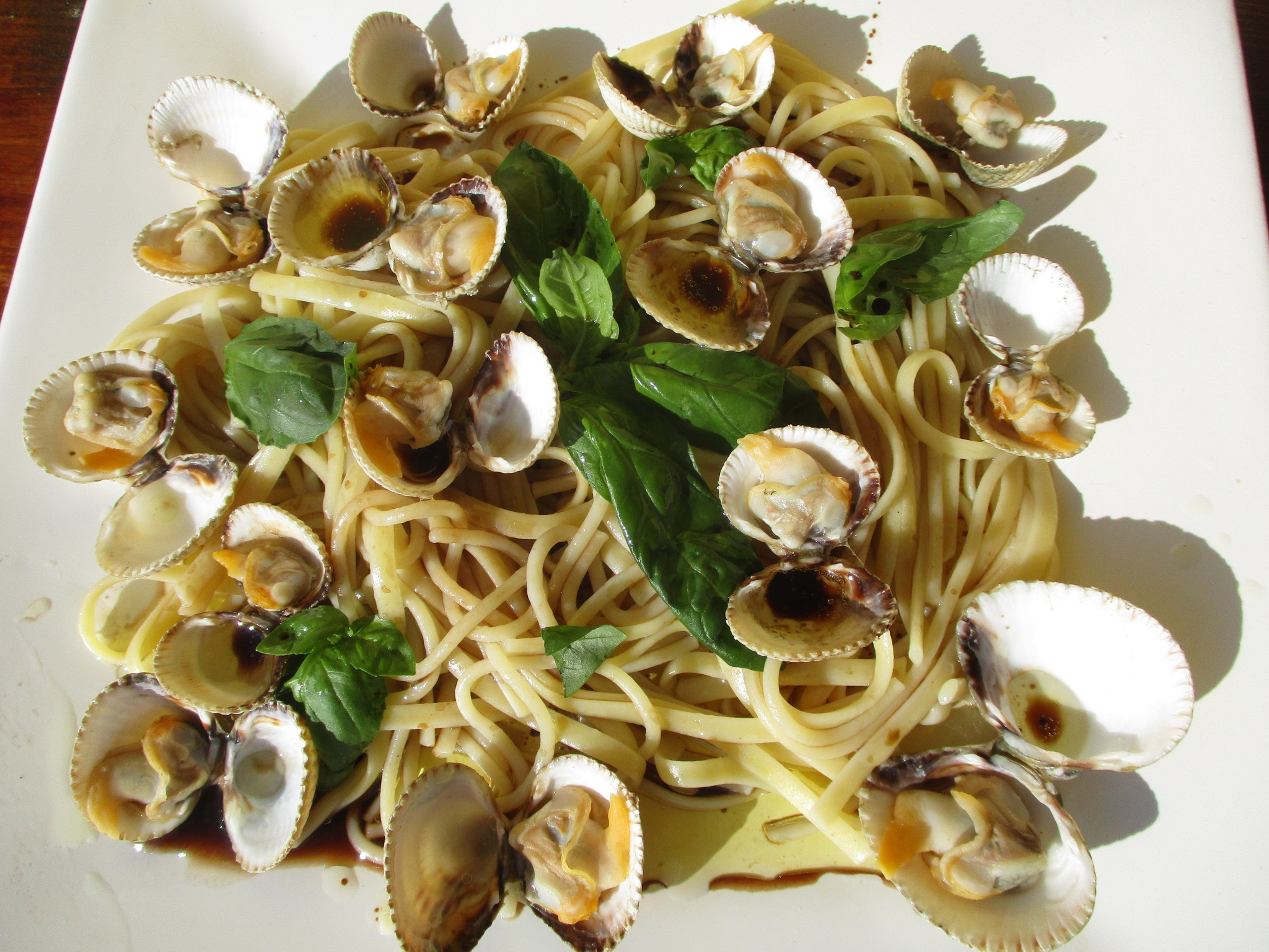 Spaghettis et linguines aux coques, basilic, huile d'olive et basalmiv